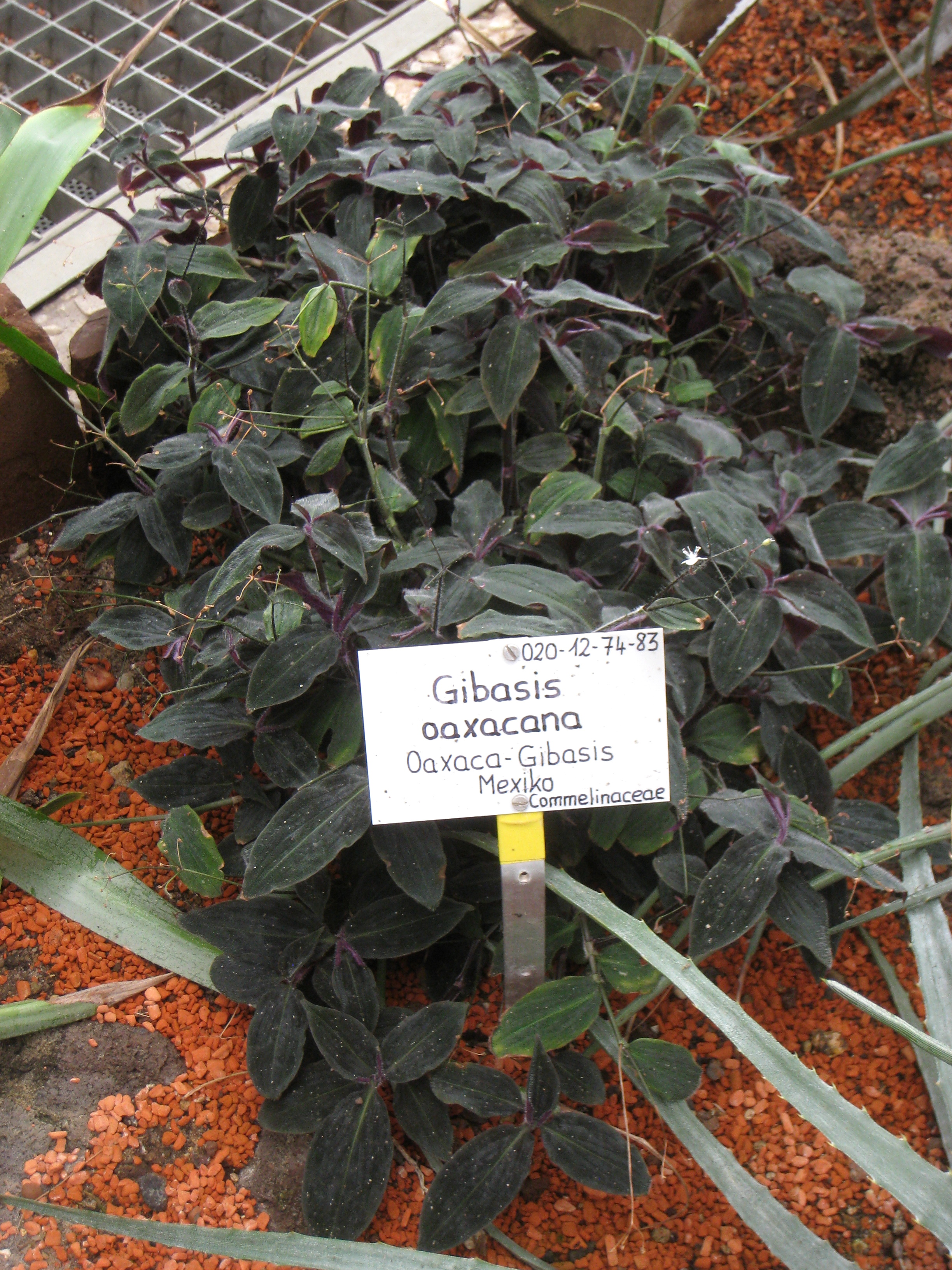 Gibasis oaxacana specimen in the Botanischer Garten, Berlin-Dahlem (Berlin Botanical Garden), Berlin, Germany.